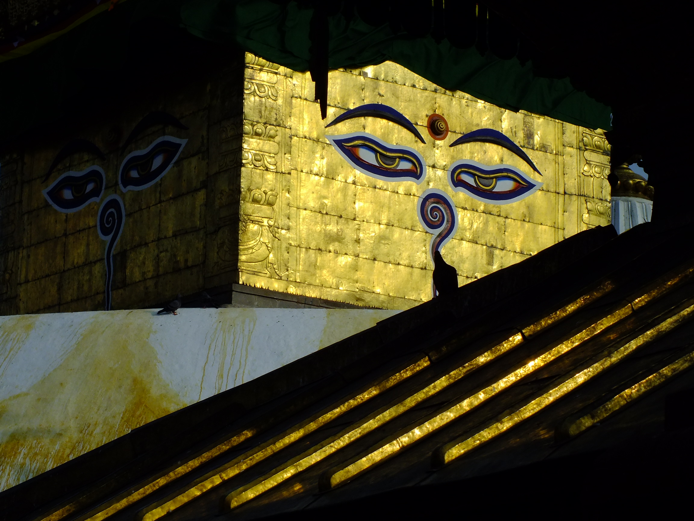 2015-03-08 Swayambhunath,Katmandu,Nepal,சுயம்புநாதர் கோயில்,スワヤンブナート